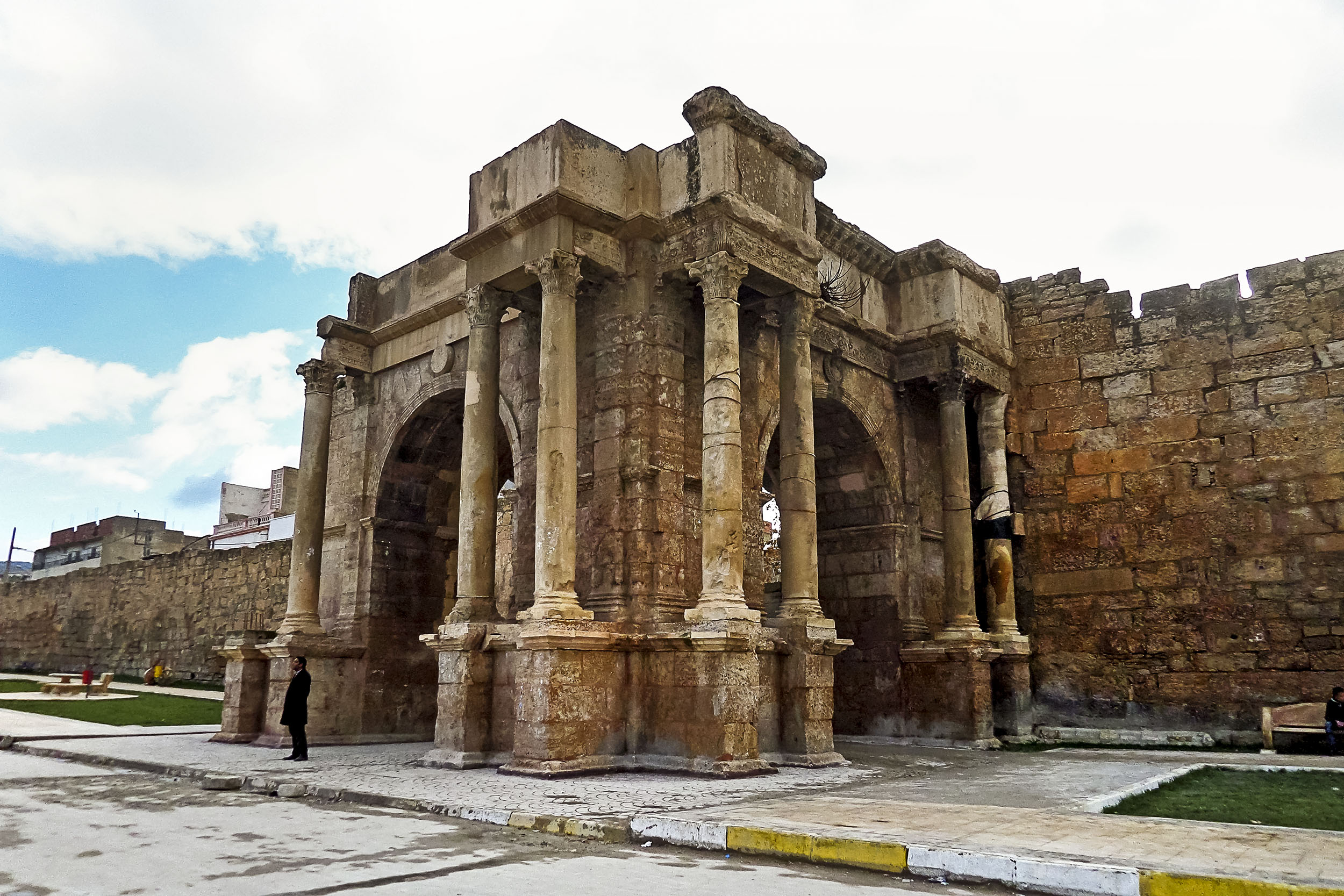 Wilaya de Tébessa ولاية تبسة Porte Caracalla - Tébessa باب كركلا - تبسة